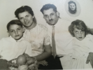 משפחת סטבורובסקי ברחוב מלצ'ט 14, תל אביב, צולם בשנת 1963